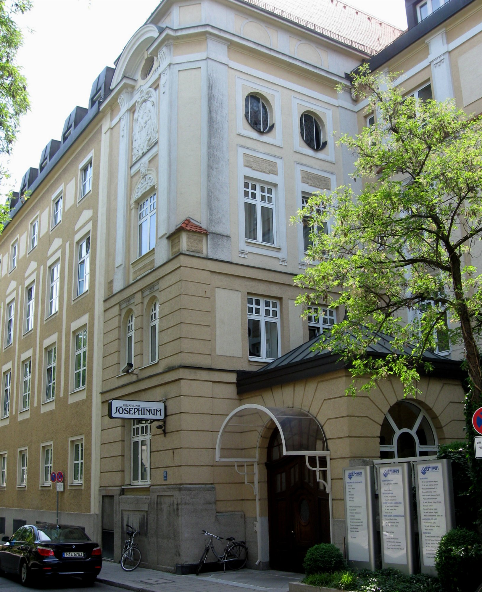 Josephinum, München, Schönfeldstr.